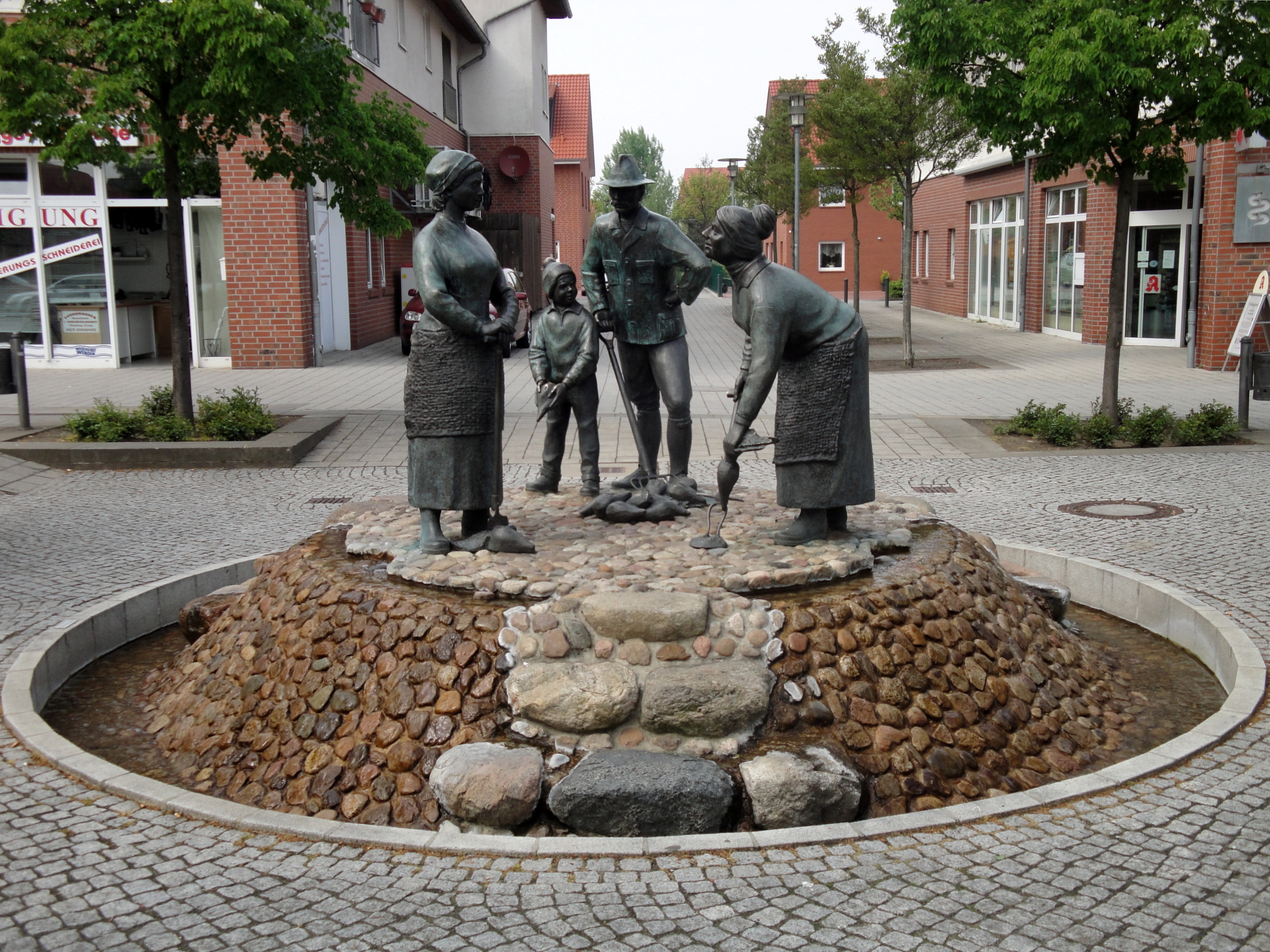 Bronzefiguren "Rübenbauern" von Georg Arfmann in Meine